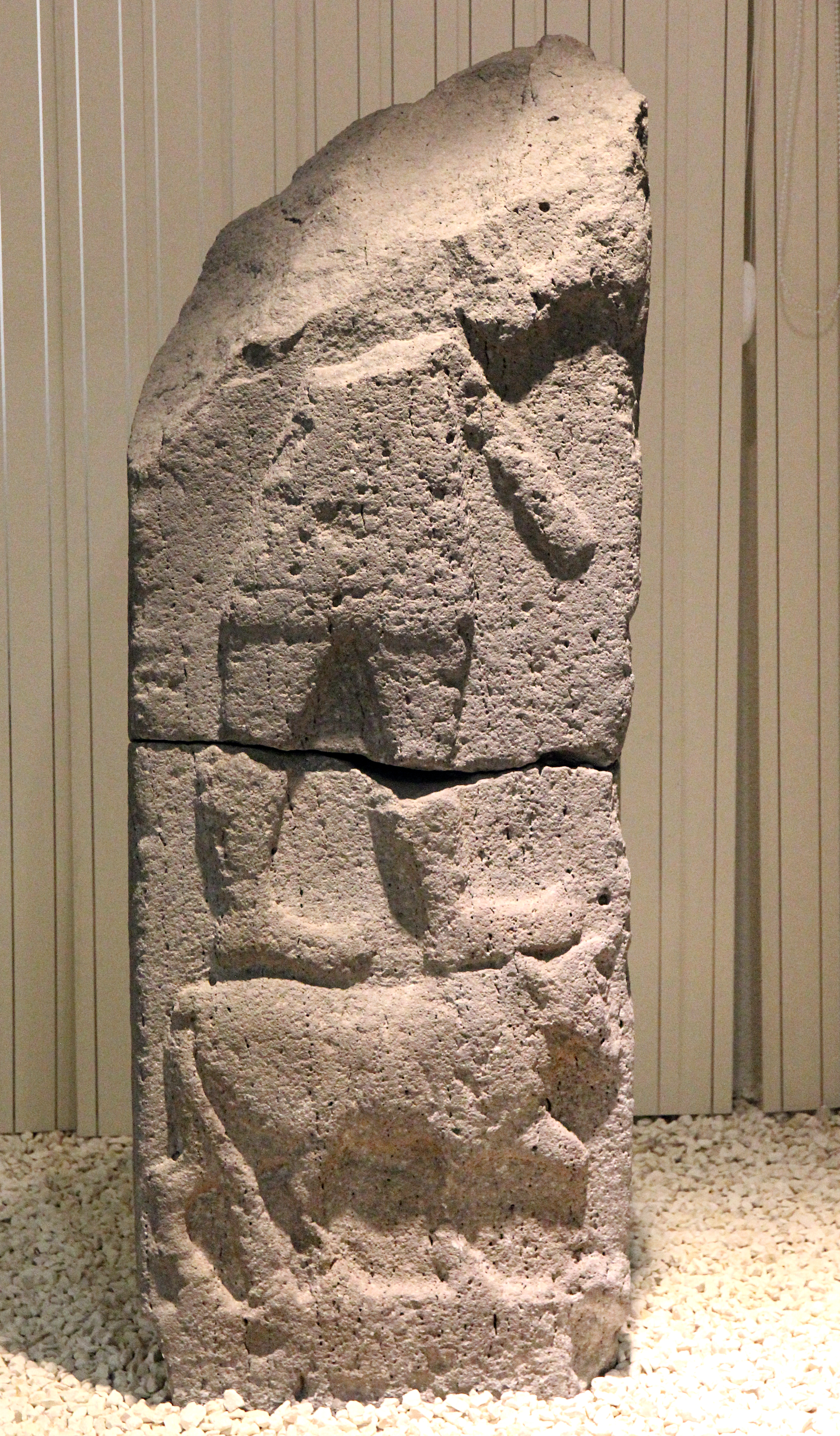 Archäologisches Museum Şanlıurfa, Südosttürkei, Relief eines hethitischen Wettergottes aus Gölpınar